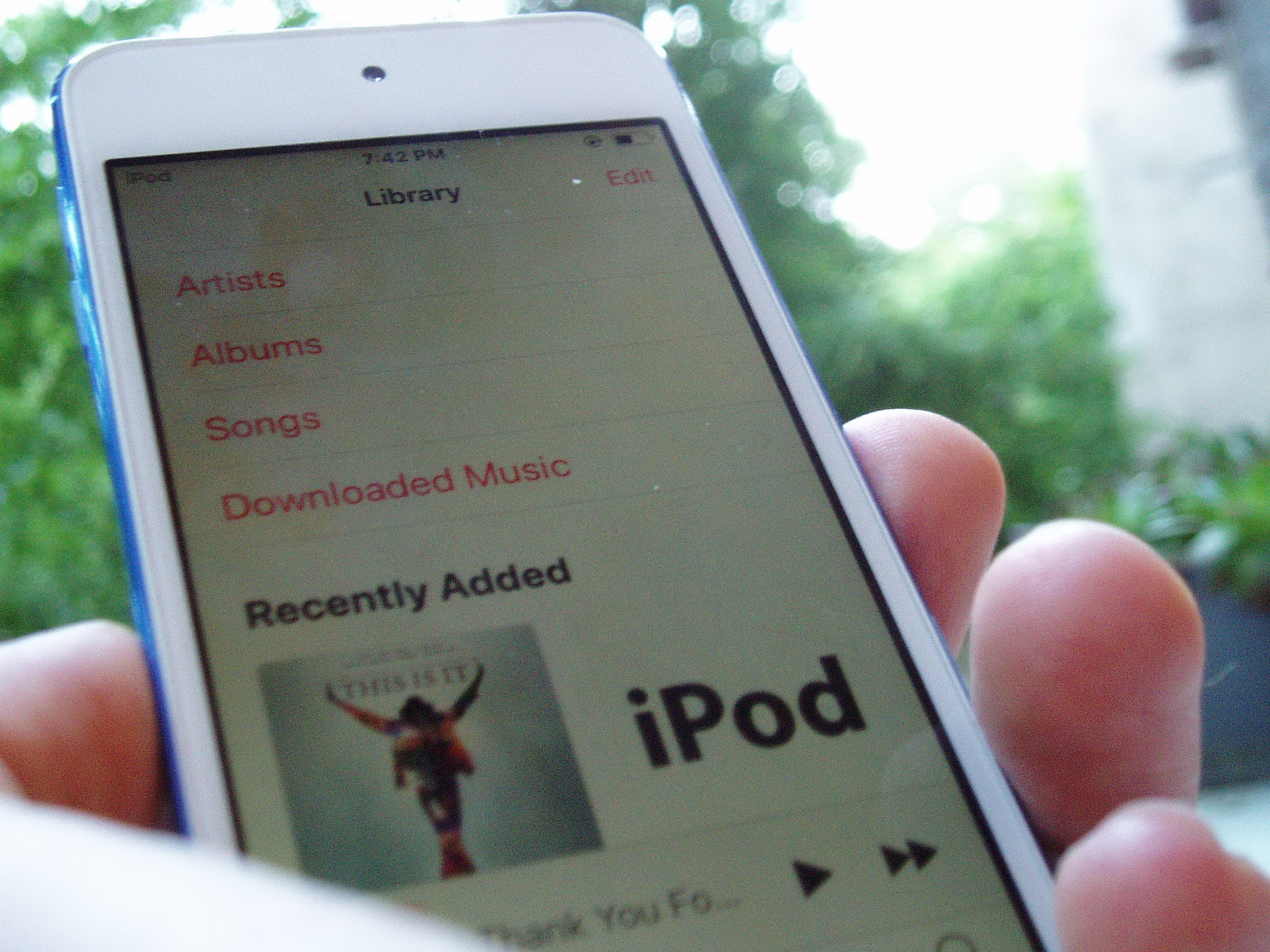 iPod 6th gen